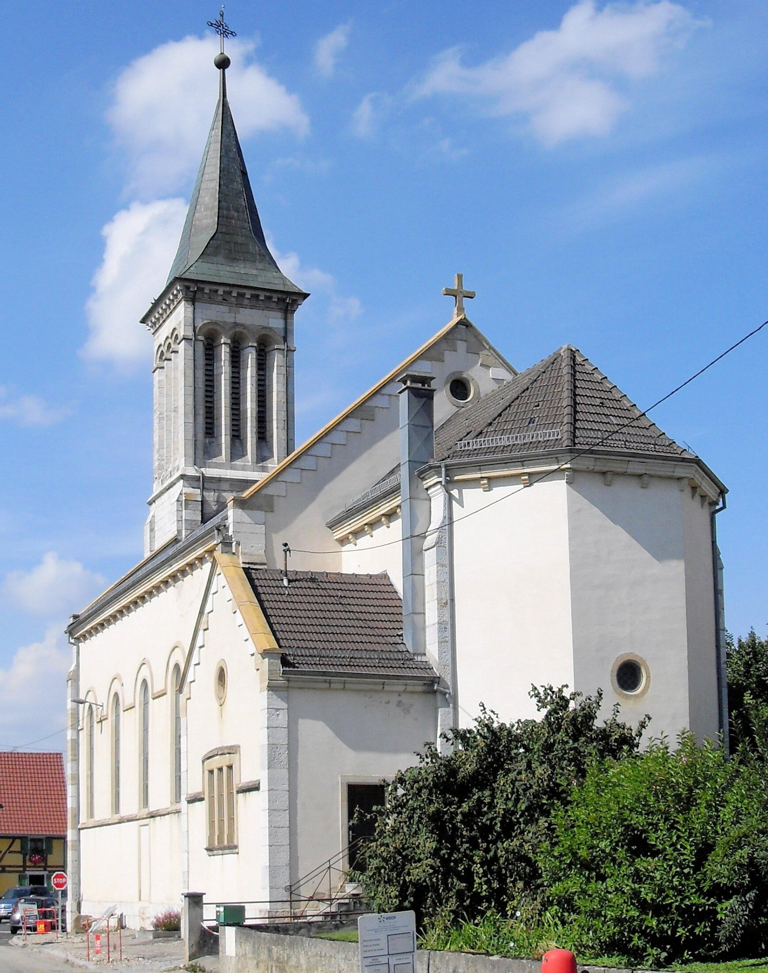 L'église Saint-Wendelin à Werentzhouse, côté sud